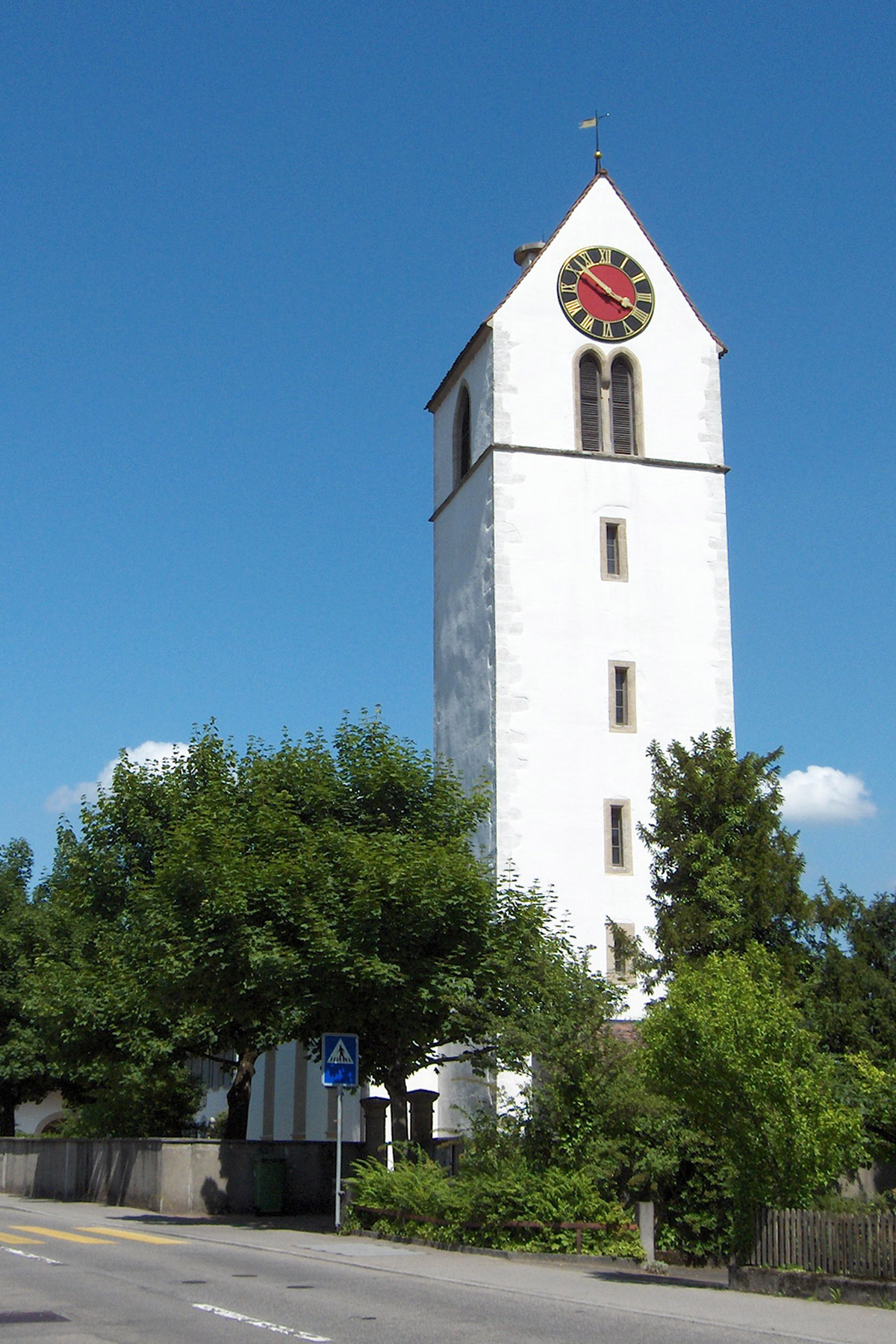 Umiken: Reformierte Kirche Fotografiert durch Voyager, 28. Juni 2006